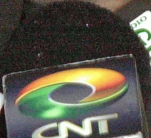 Detalhe de um microfone darede de televisão brasileira CNT